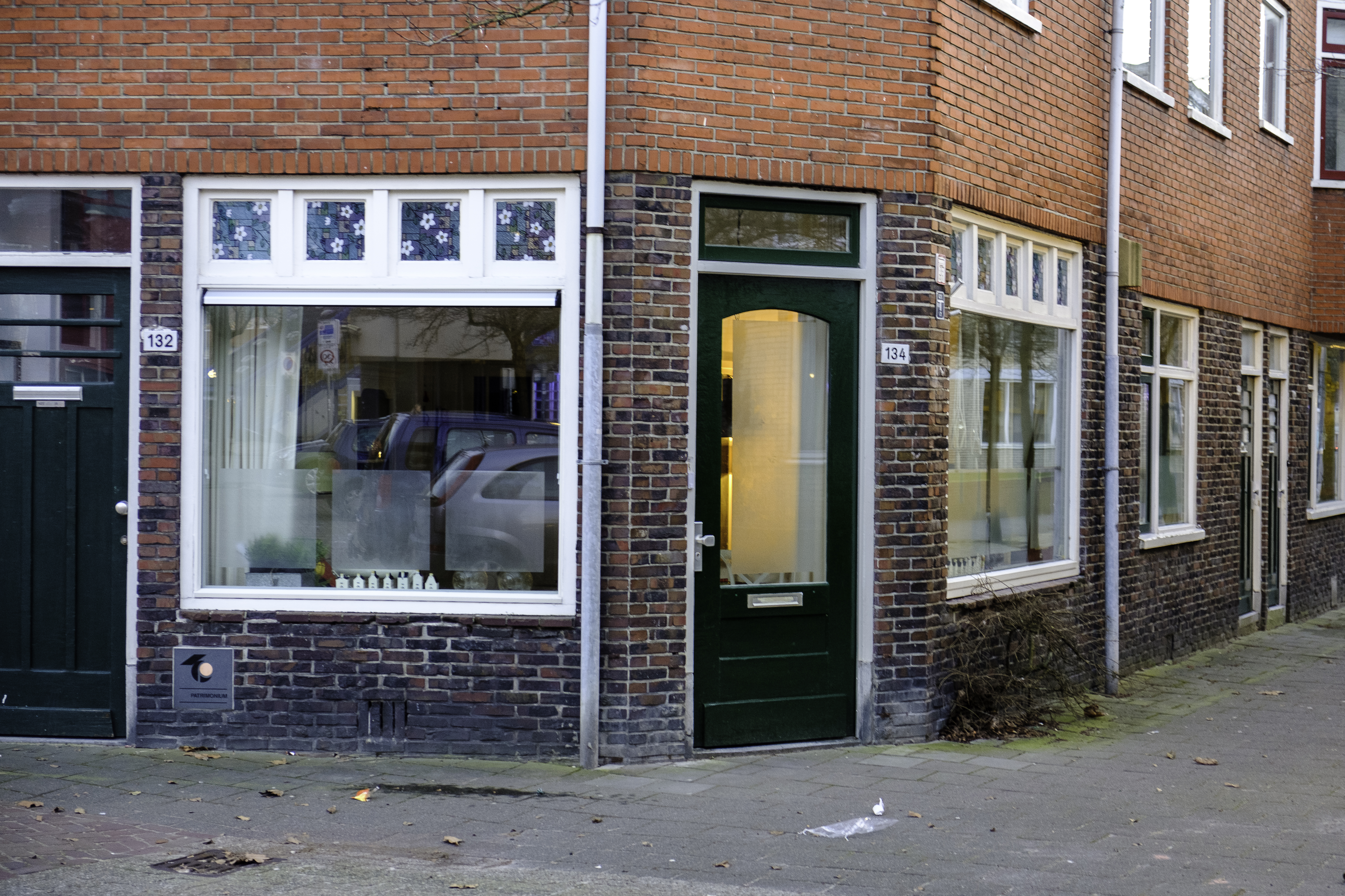 voormalig kantoor van de wijkraad van de Davidstraatbuurt